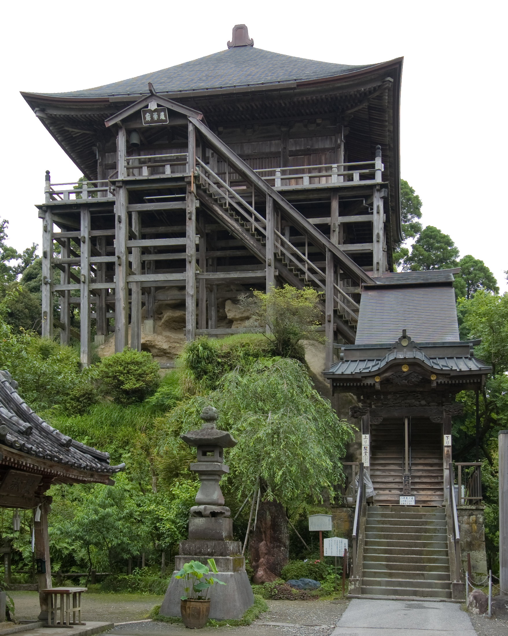 Kasamori-ji, at Chōnan, Chiba, Jpan.